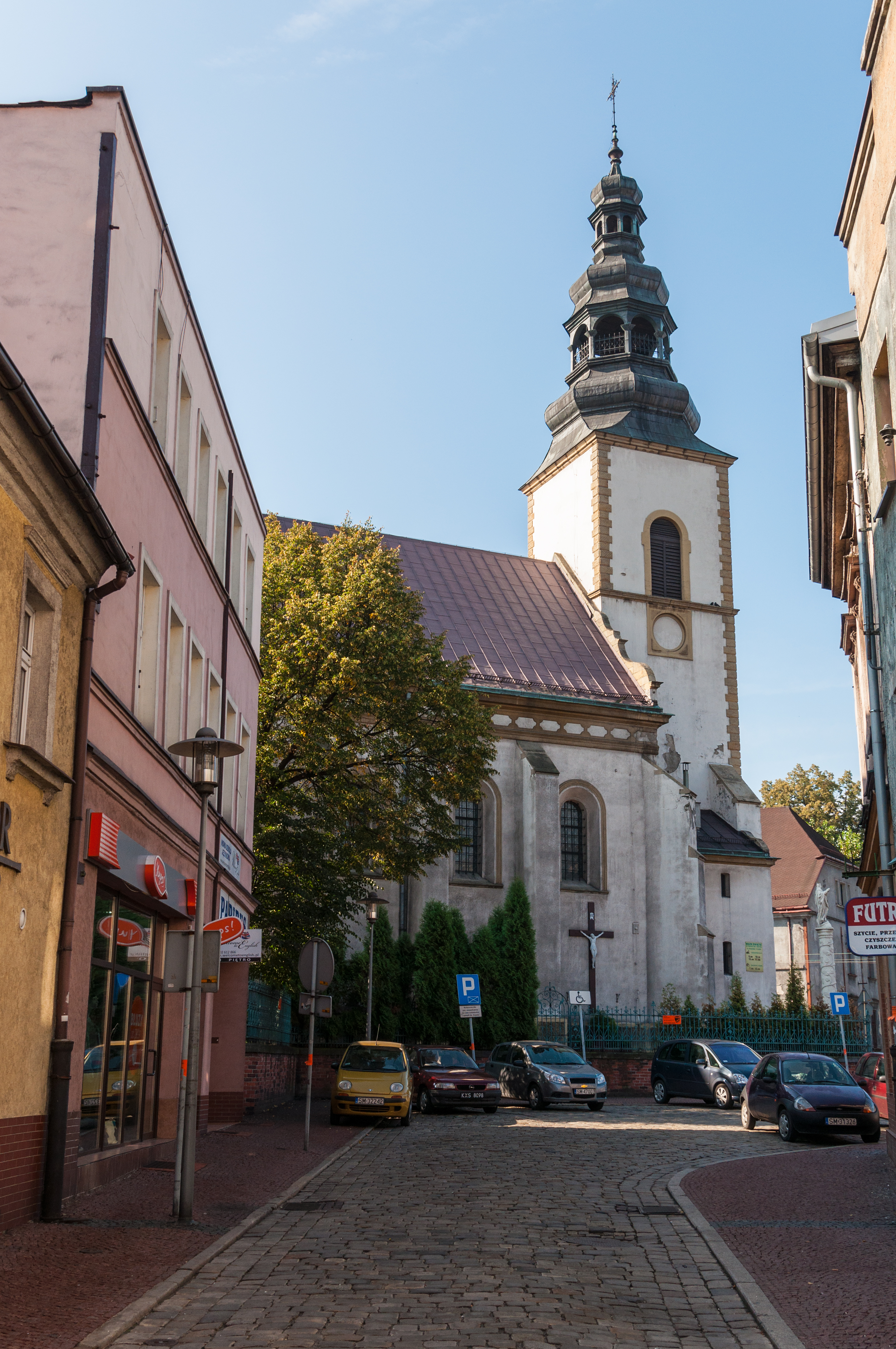 Mysłowice, ul. Starokościelna 5. Kościół filialny pw. Narodzenia NMP, XIV, 1740-1744, 1901-1903.